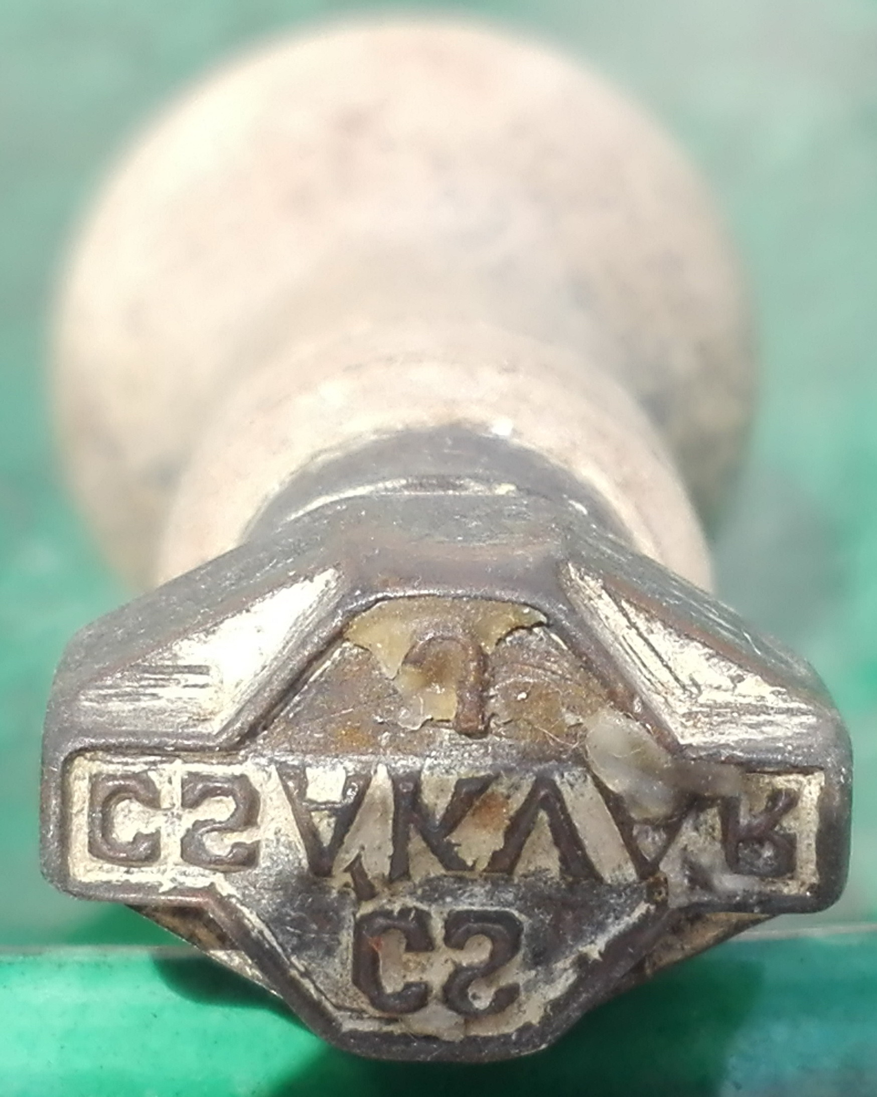 Csizmadia János (fazekas) pecsétnyomója A seal of an applied artists from Hungary